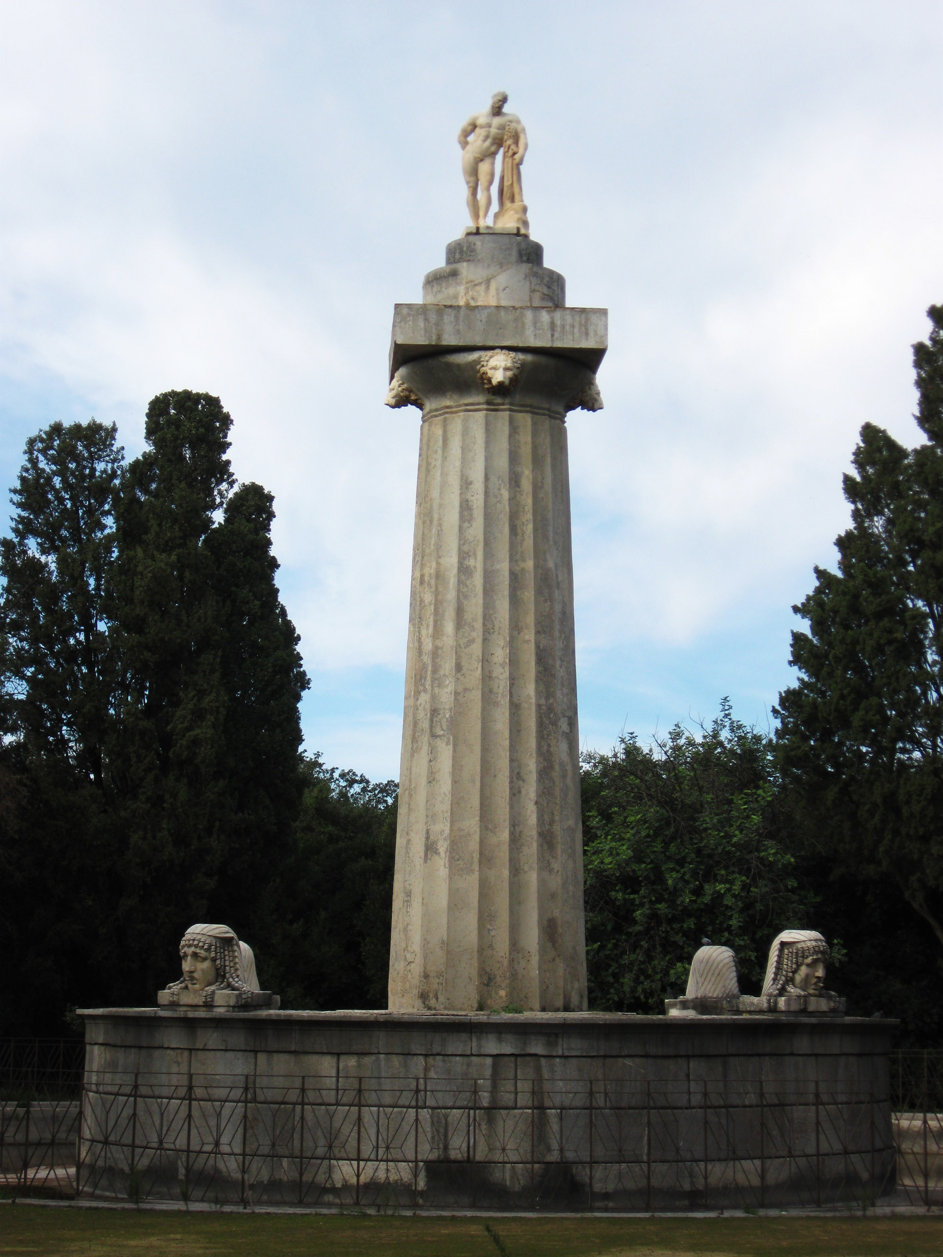 Fontana d Ercole - Parco della Favorita - Palermo (Italy)